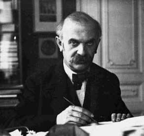 Julius Tandler (1869-1939), rakouský lékař moravského původu, anatom a sociálně-demokratický politik